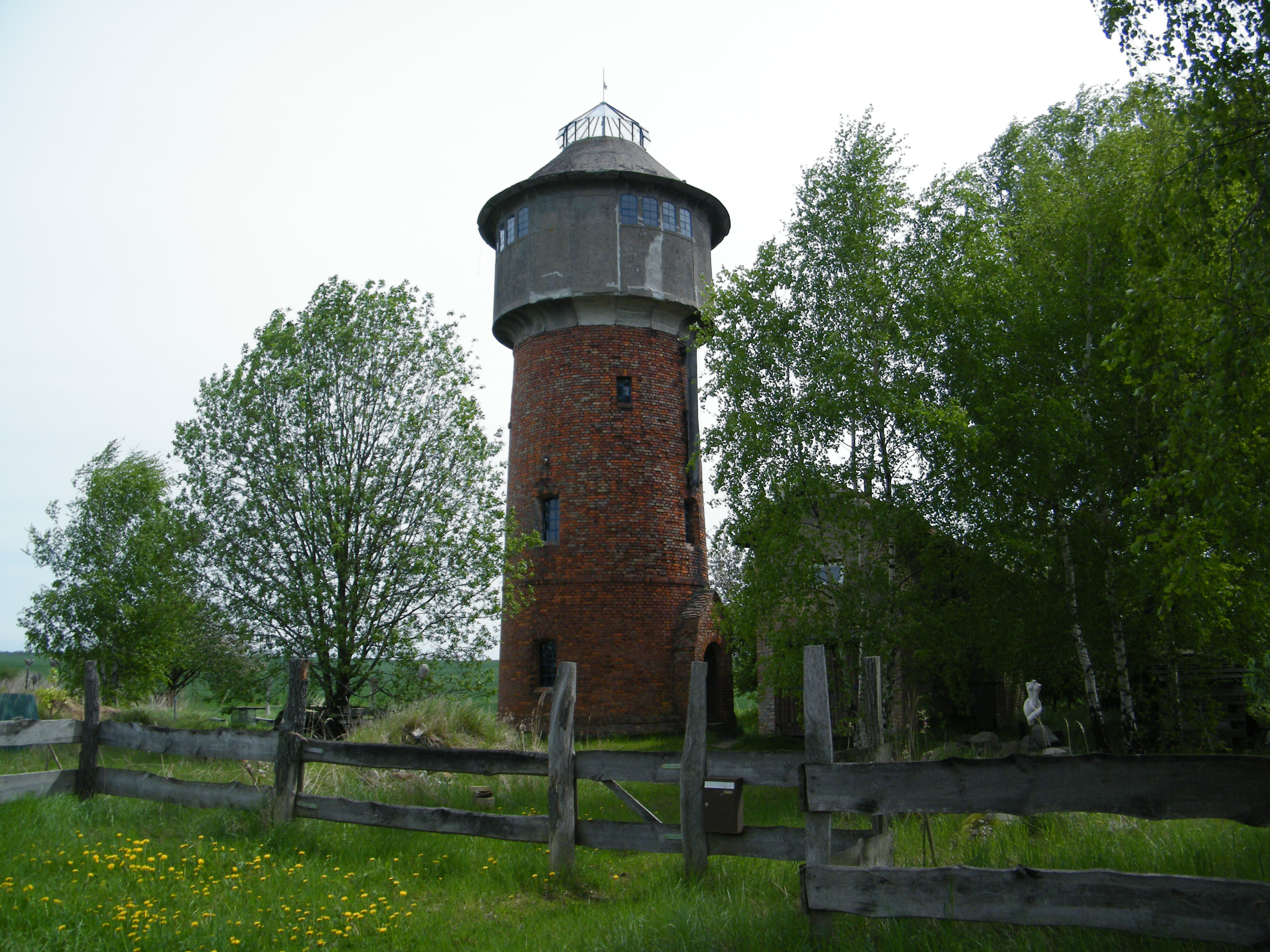 Bahnstrecke Fährkrug–Fürstenwerder, Wasserturm in Hardenbeck